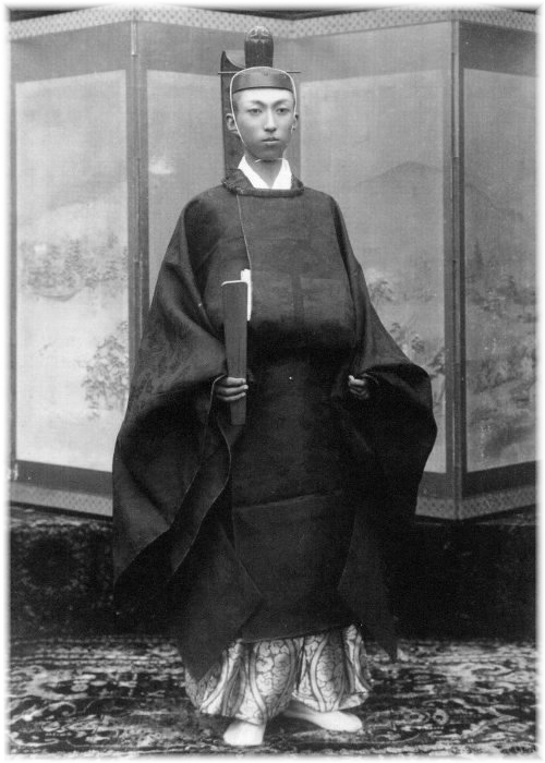 山階芳麿 のち山階鳥類研究所を創設